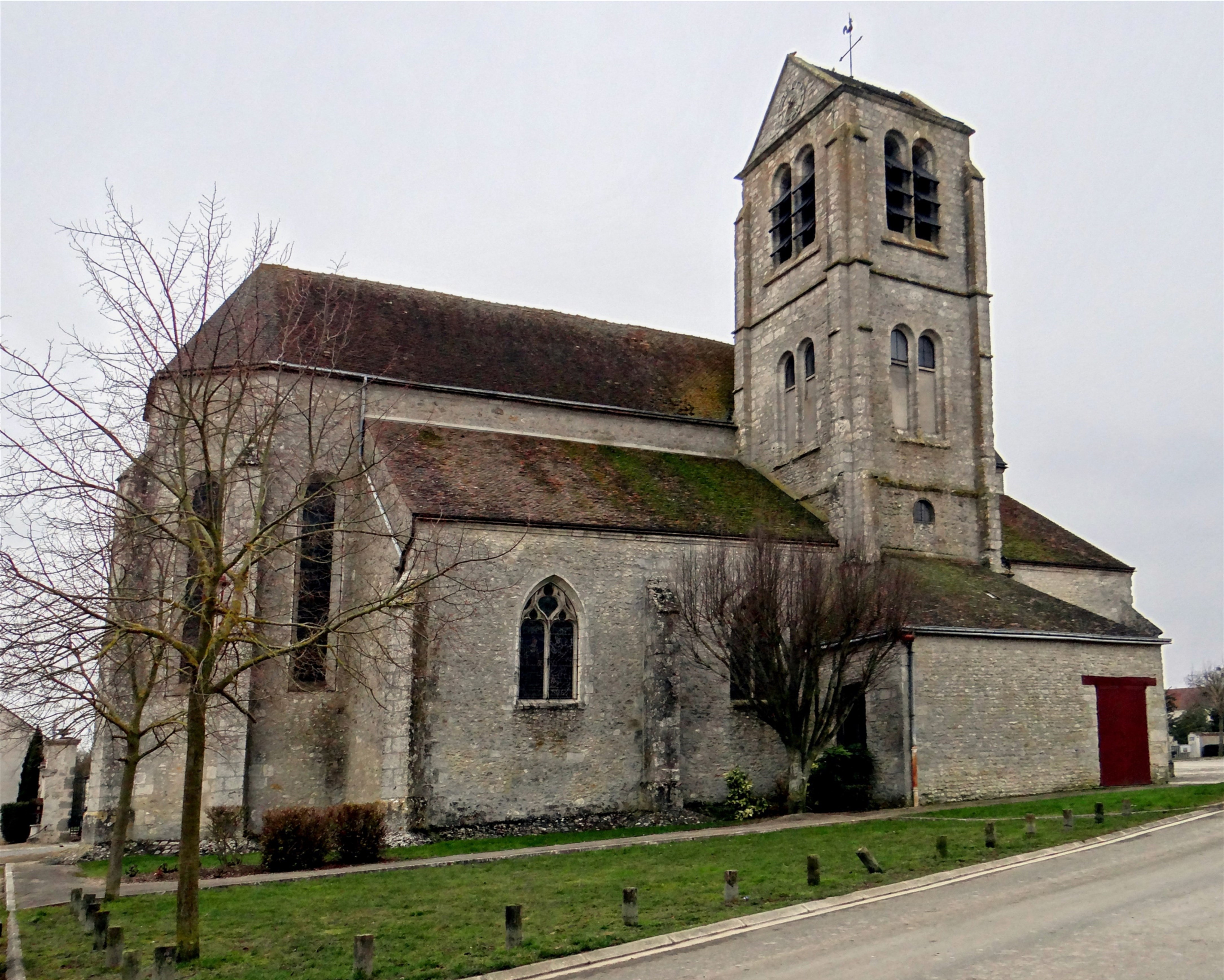 Église Saint-Martin, Auxy, Loiret, France.